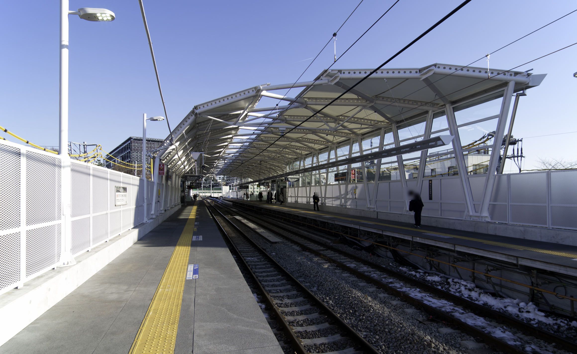 東京急行電鉄大井町線緑が丘駅駅ホーム